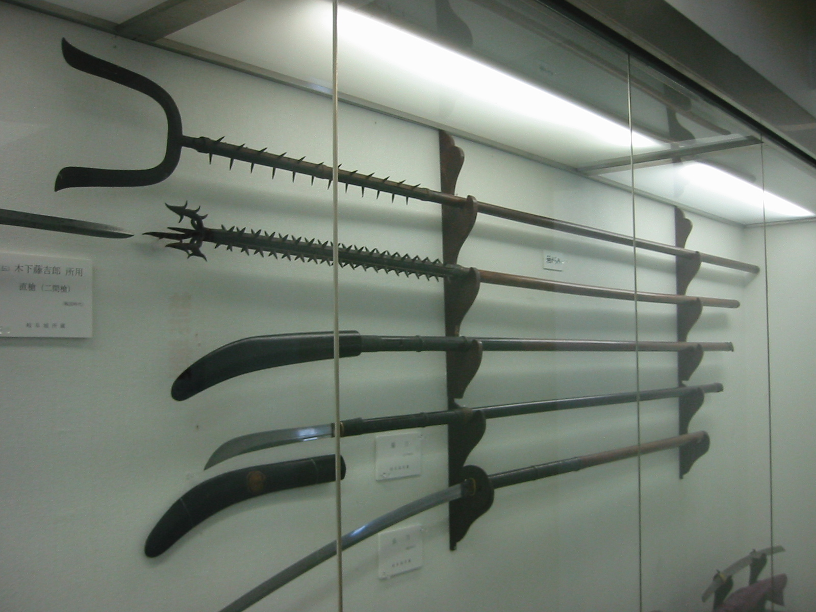 槍岐阜城にて